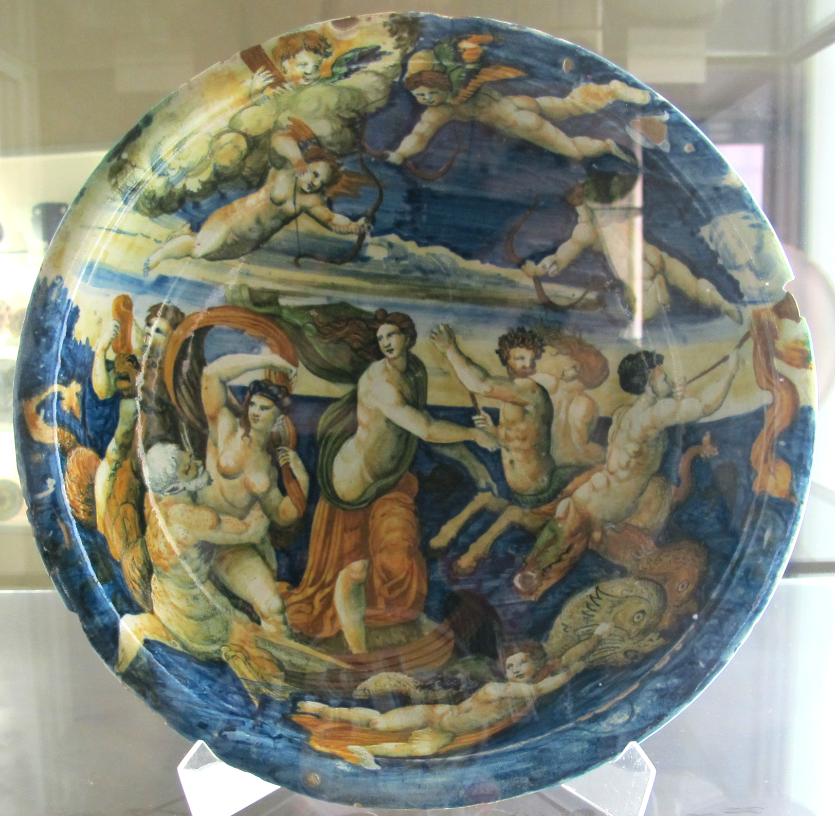 Museo Nazionale d'Arte Medievale e Moderna - MIBAC This is a photo of a monument which is part of cultural heritage of Italy.